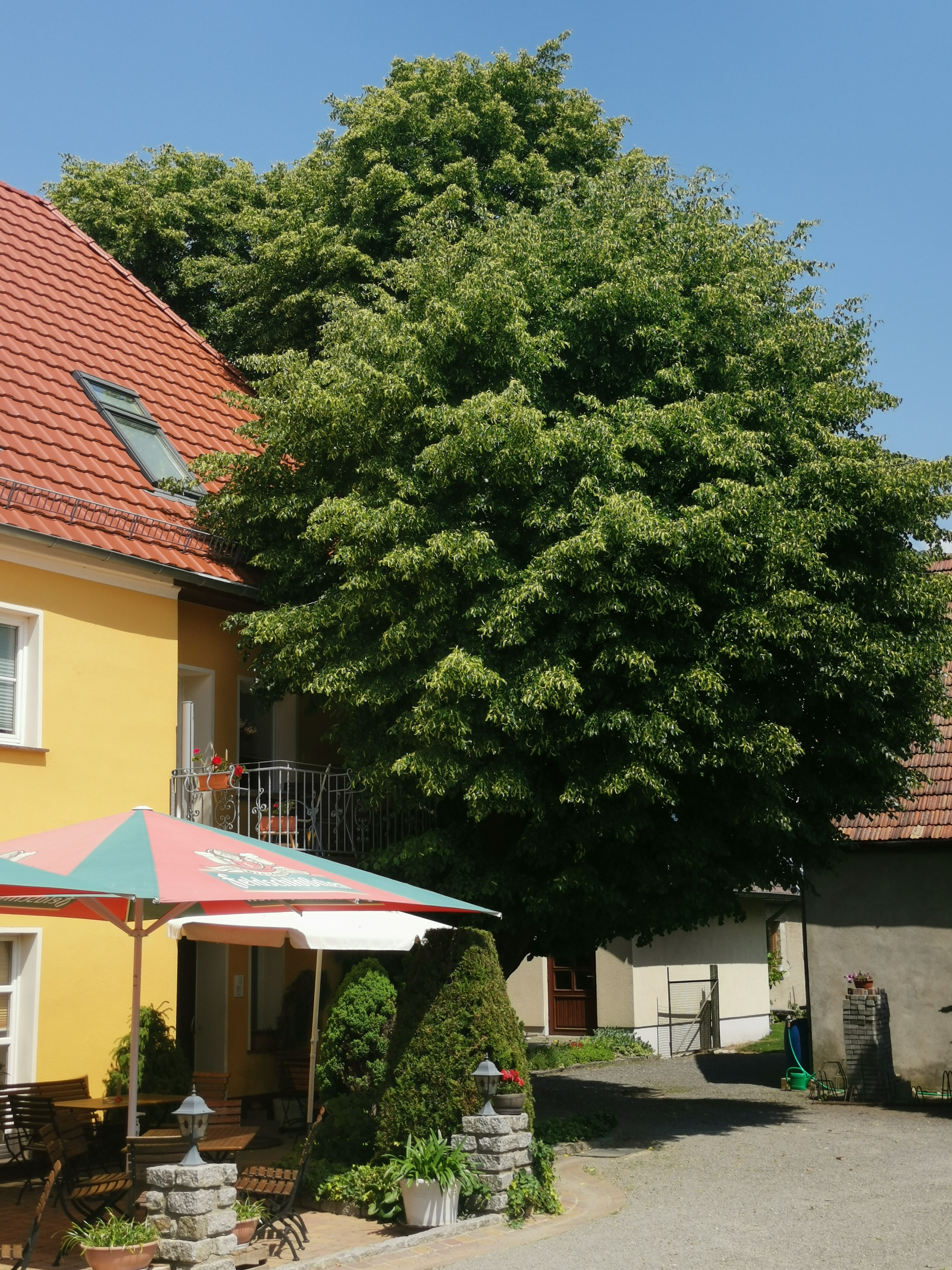 Als Naturdenkmal geschützte Winterlinde am Gasthof Großkmehlen